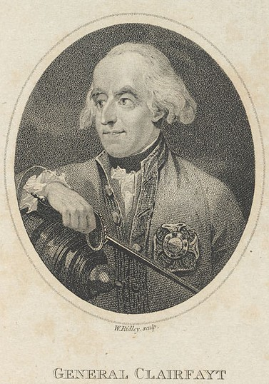 Charles Joseph de Croix, (1733-1798) Title: Karl Josef Graf von Clairfayt von Croix Work Type: portraits; engravings Creator: Ridley, William (1764-1838), engraver Date: July 27, 1794 Description: Variant title from caption. / Quarter-length figure turned to left, in oval; in uniform, holding sword in right hand. Dimensions: 9.3 x 7.8 cm. Materials/Techniques: engraving (printing process) on paper Note: General: Legal portrait collection. Inscription: On piece: Engraved for the Register of the Times. Published July 27, 1794 by B. Crosby, Repository: Harvard Law School Library Record Identifier: olvwork176151